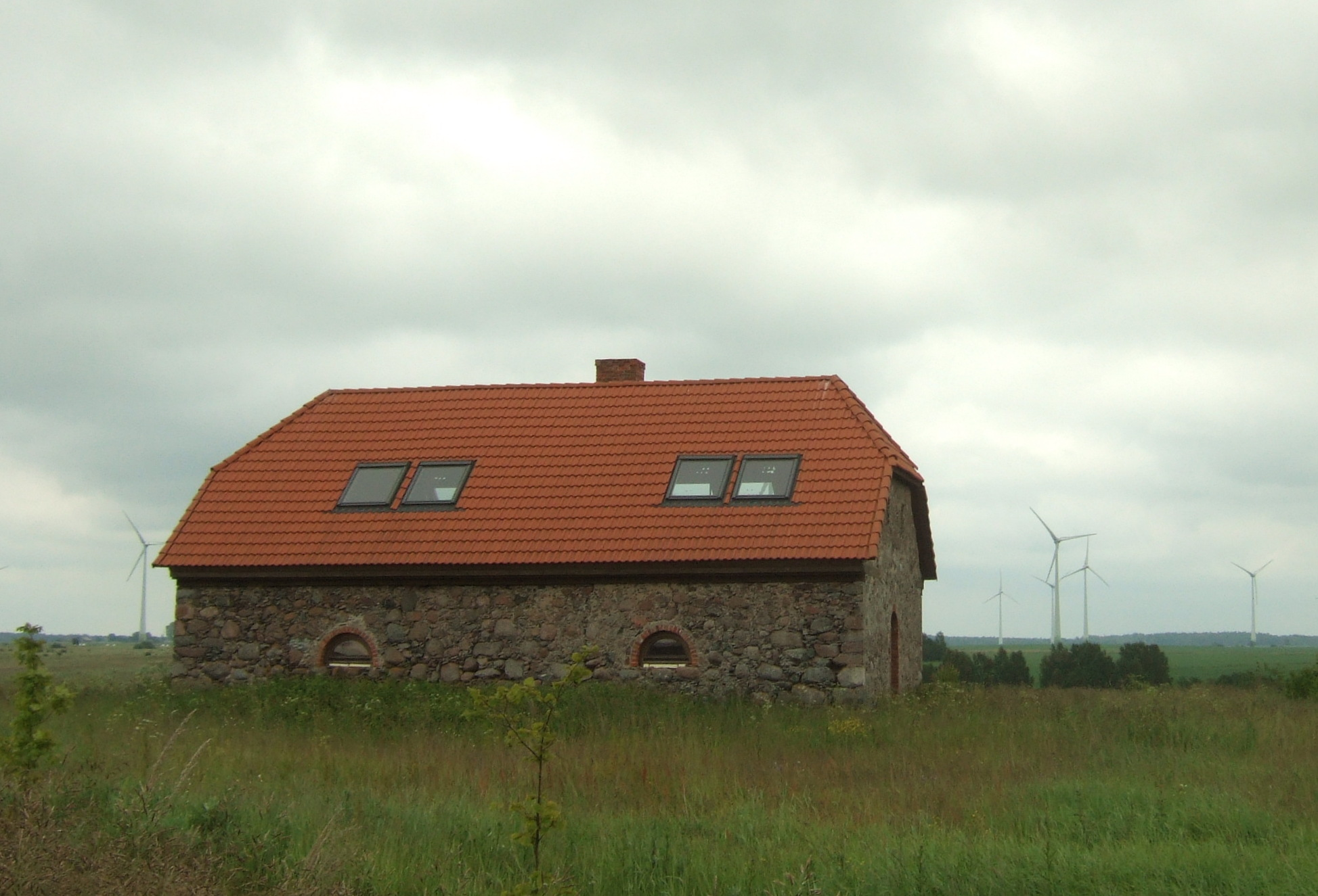 Laukžemės grūdų sandėlis-magazinas